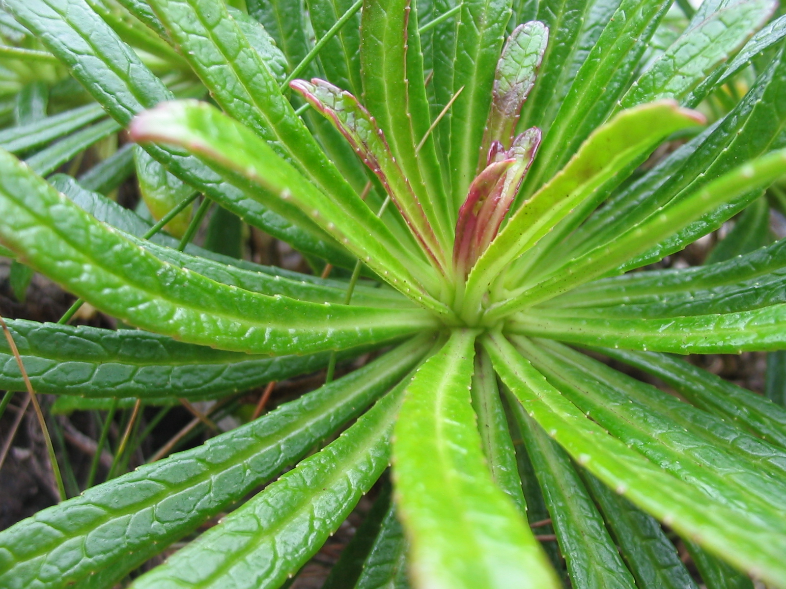 Azoren-Glockenblume (Azorina vidalii) - Habitus